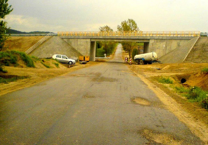 fota z 2008r